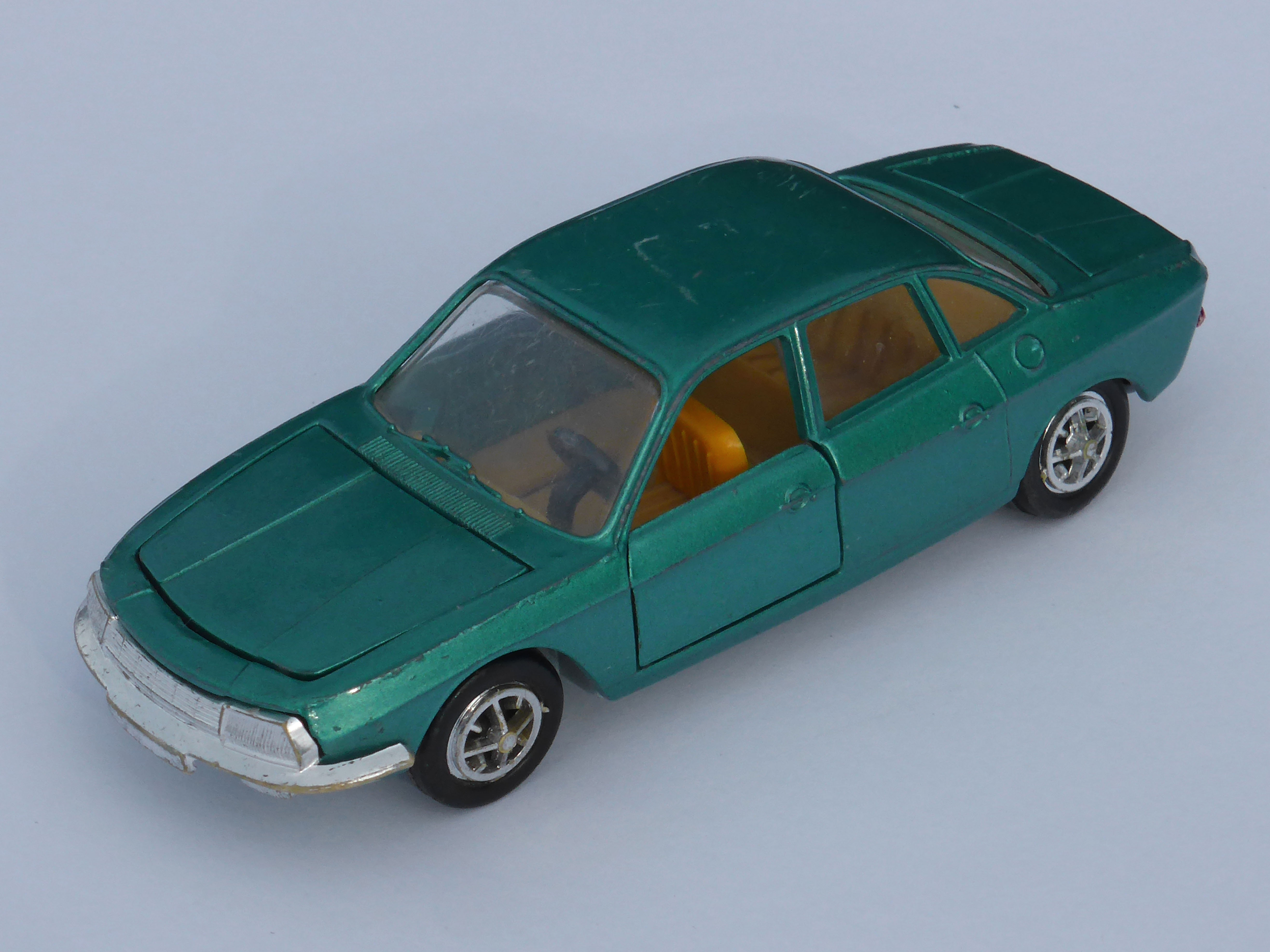 Modellauto "NSU Ro 80" von GAMA Nr. 9670 im Maßstab 1:43 aus den 1970er Jahren.